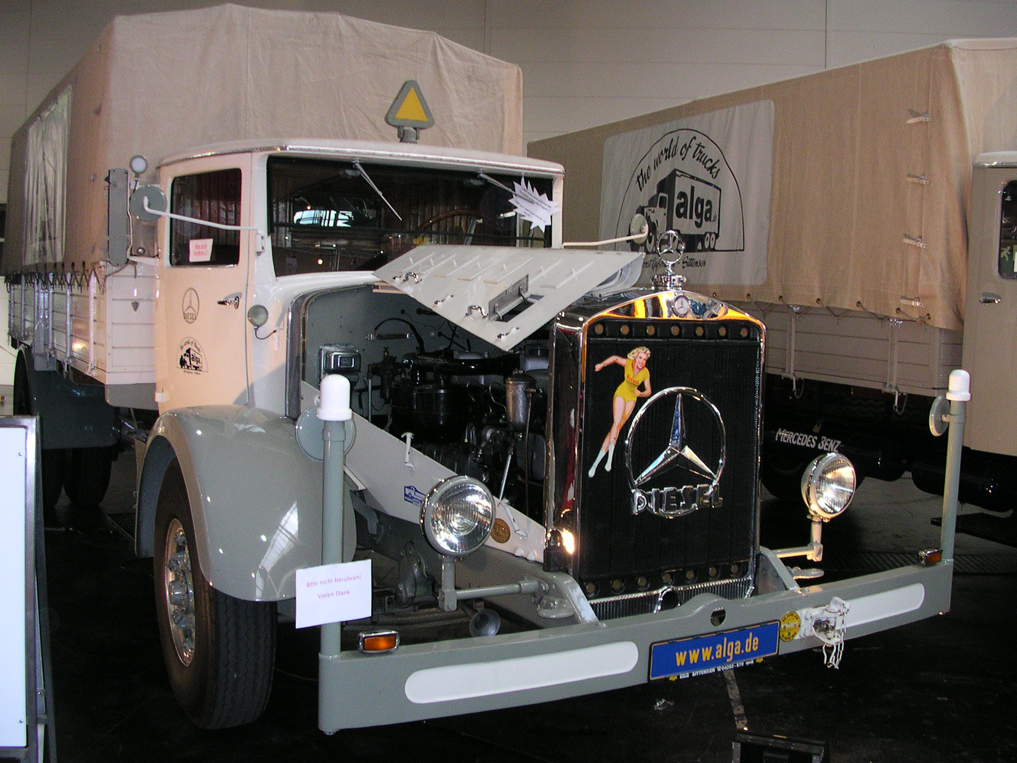 Nutzfahrzeug-IAA, Hannover 2004 Mercedes L 6500, entweder Baujahr 1936, 10220 ccm Hubraum, 85 kW (120 PS) oder Baujahr 1939, 11197 ccm Hubraum, 110 kW (150 PS)